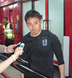 Tadaaki Hirakawa